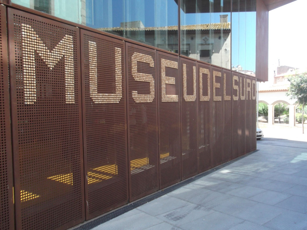 Entrada del Museu del Suro de Palafrugell